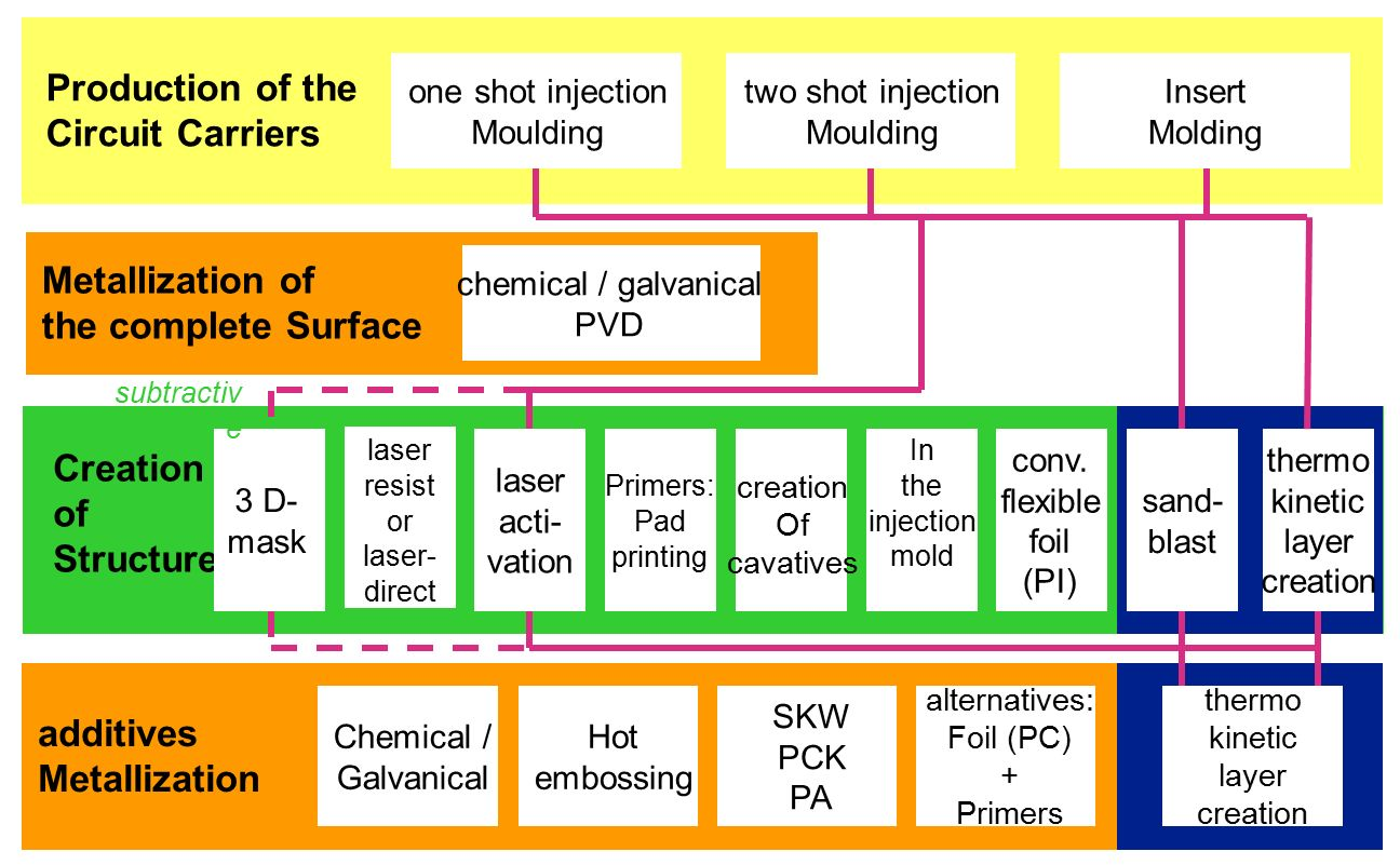 übersicht der 3D-MID verfahren